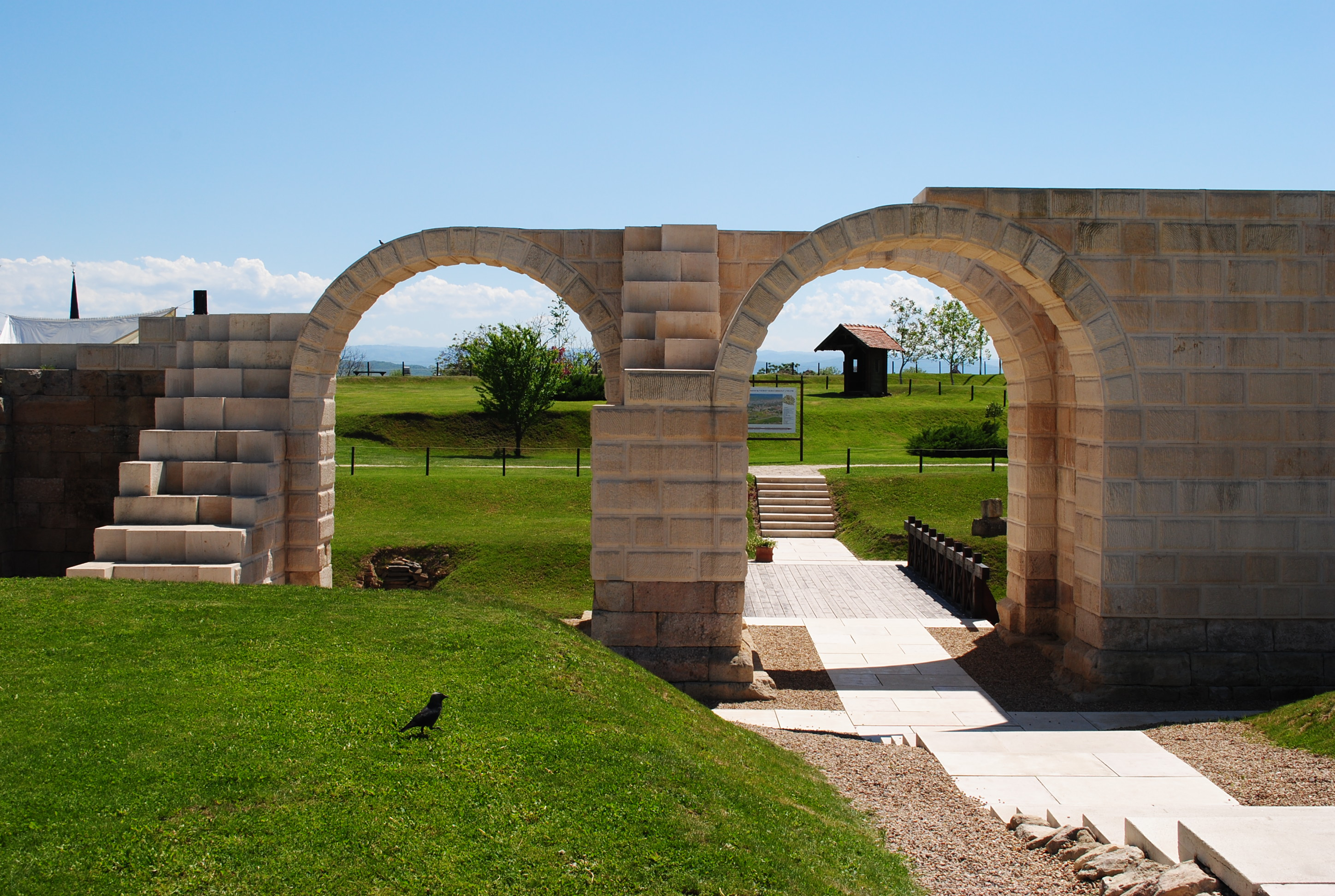 Castrul Legiunii a XIII-a Gemina, sec. II - IV p. Chr 01